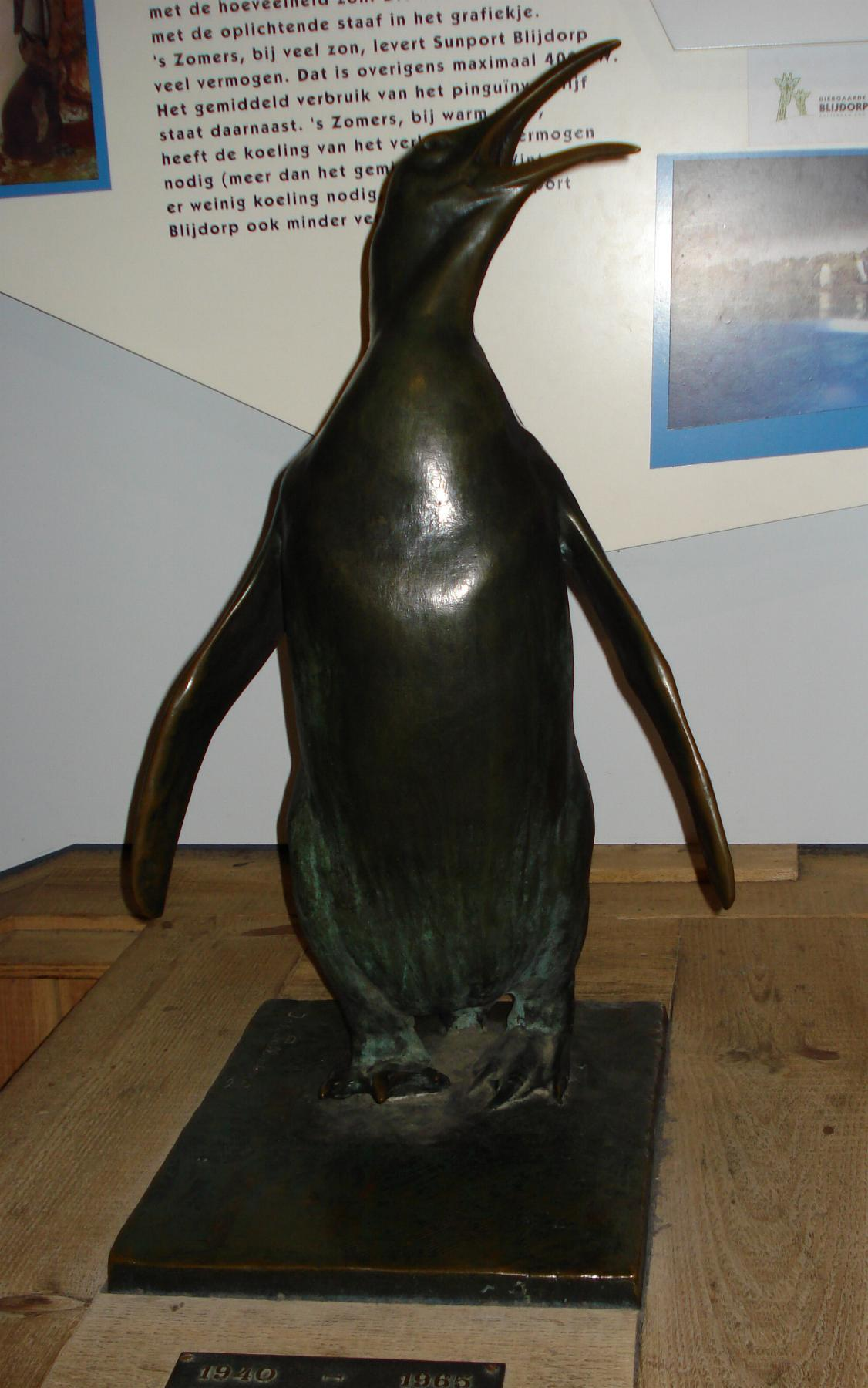 Rotterdam, diergaarde Blijdorp. Kunstwerk "Pinguin" van Josef Pallenberg. Rotterdam/The Netherlands.